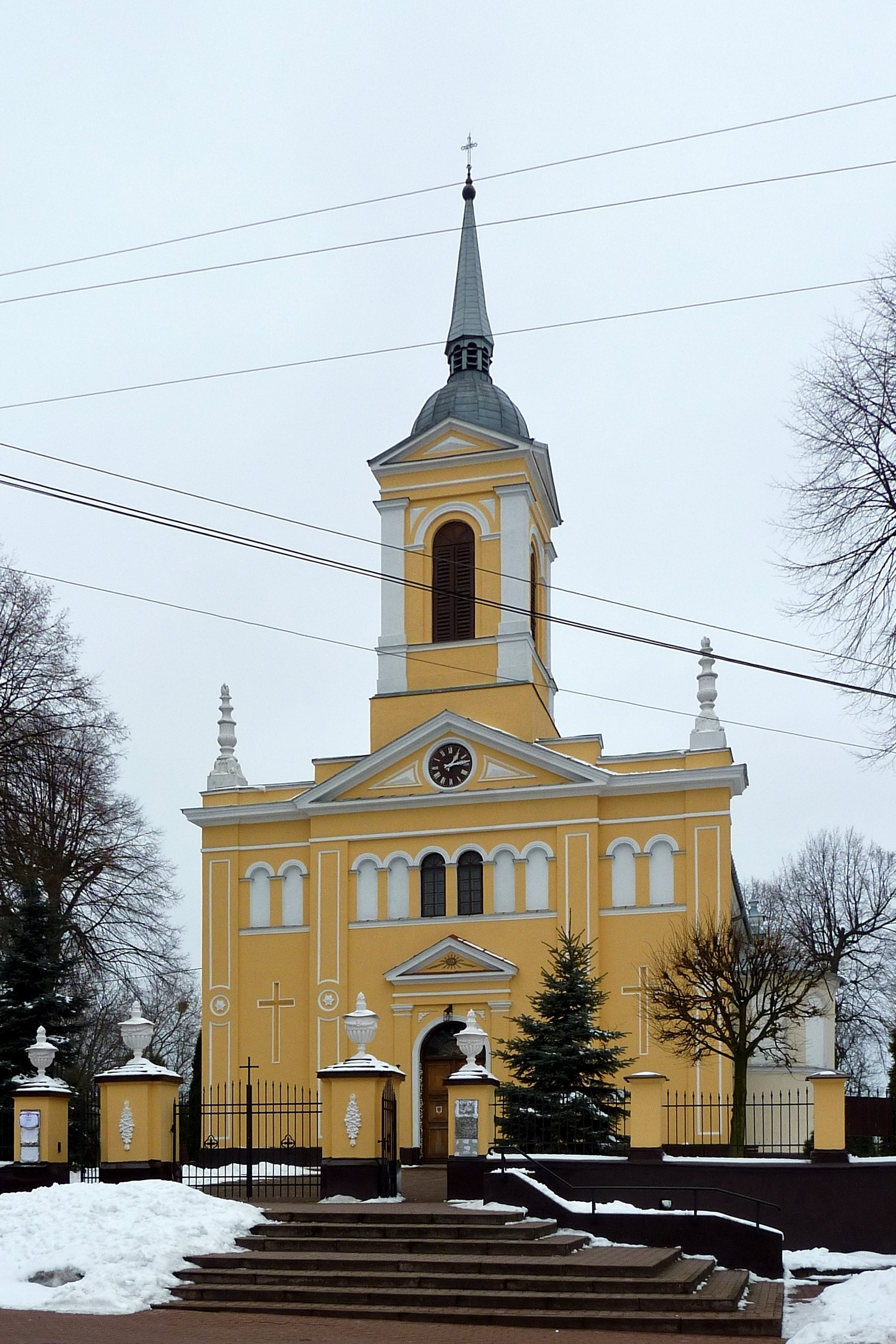 Kościół św. Jana Chrzciciela w Mszczonowie.